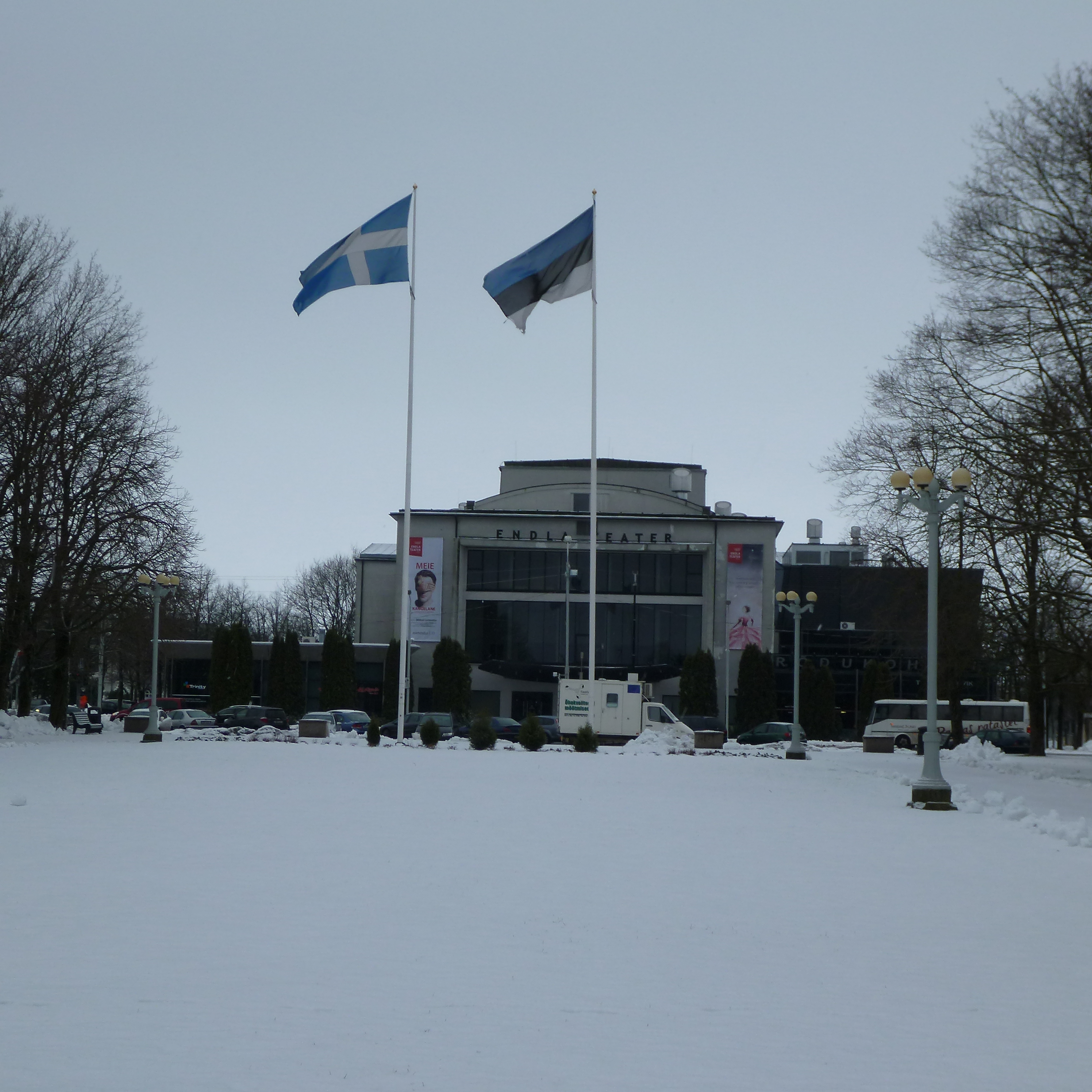 Pärnun ja Viron liput